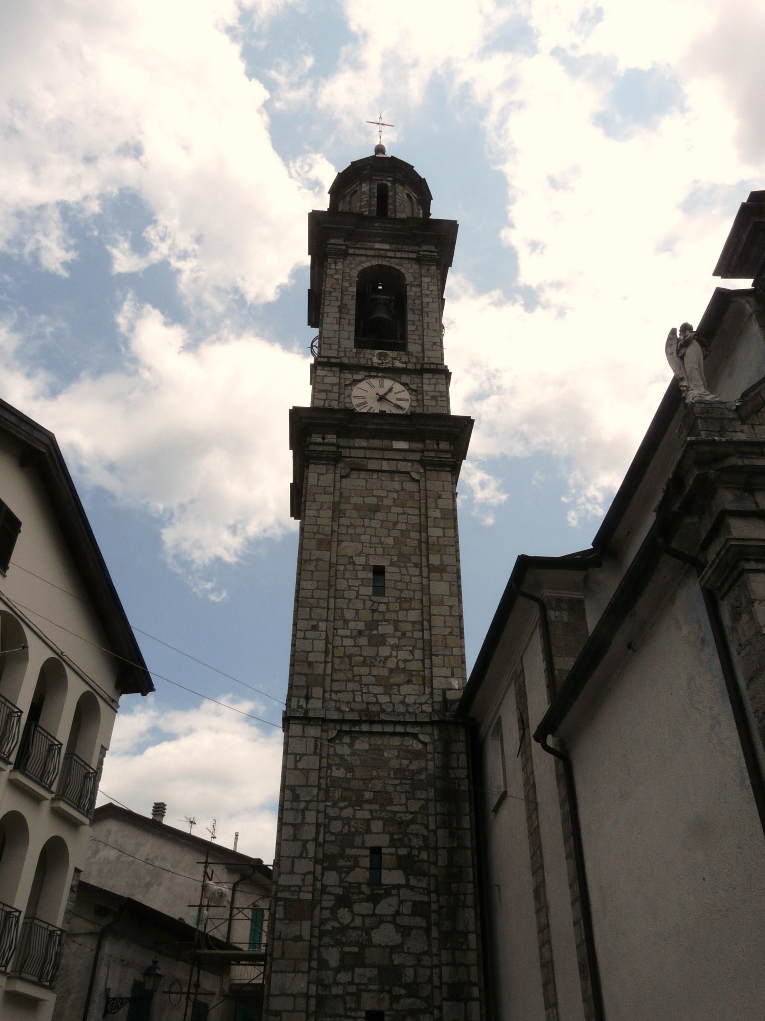 Il campanile della chiesa di Santa Maria, Santa Maria del Taro, Tornolo, Emilia-Romagna, Italia